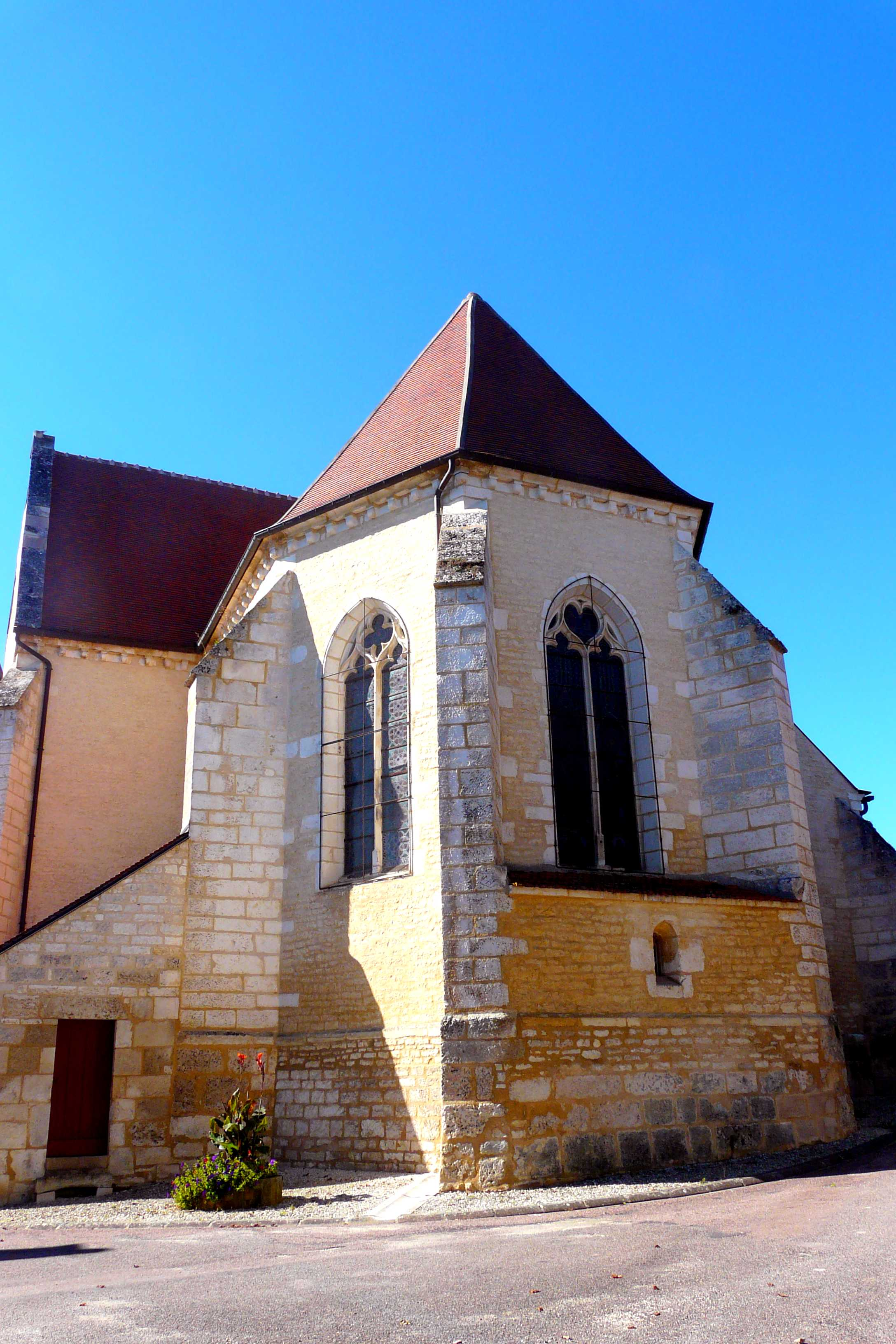 Église d'Yrouerre (InscritInscrit) .